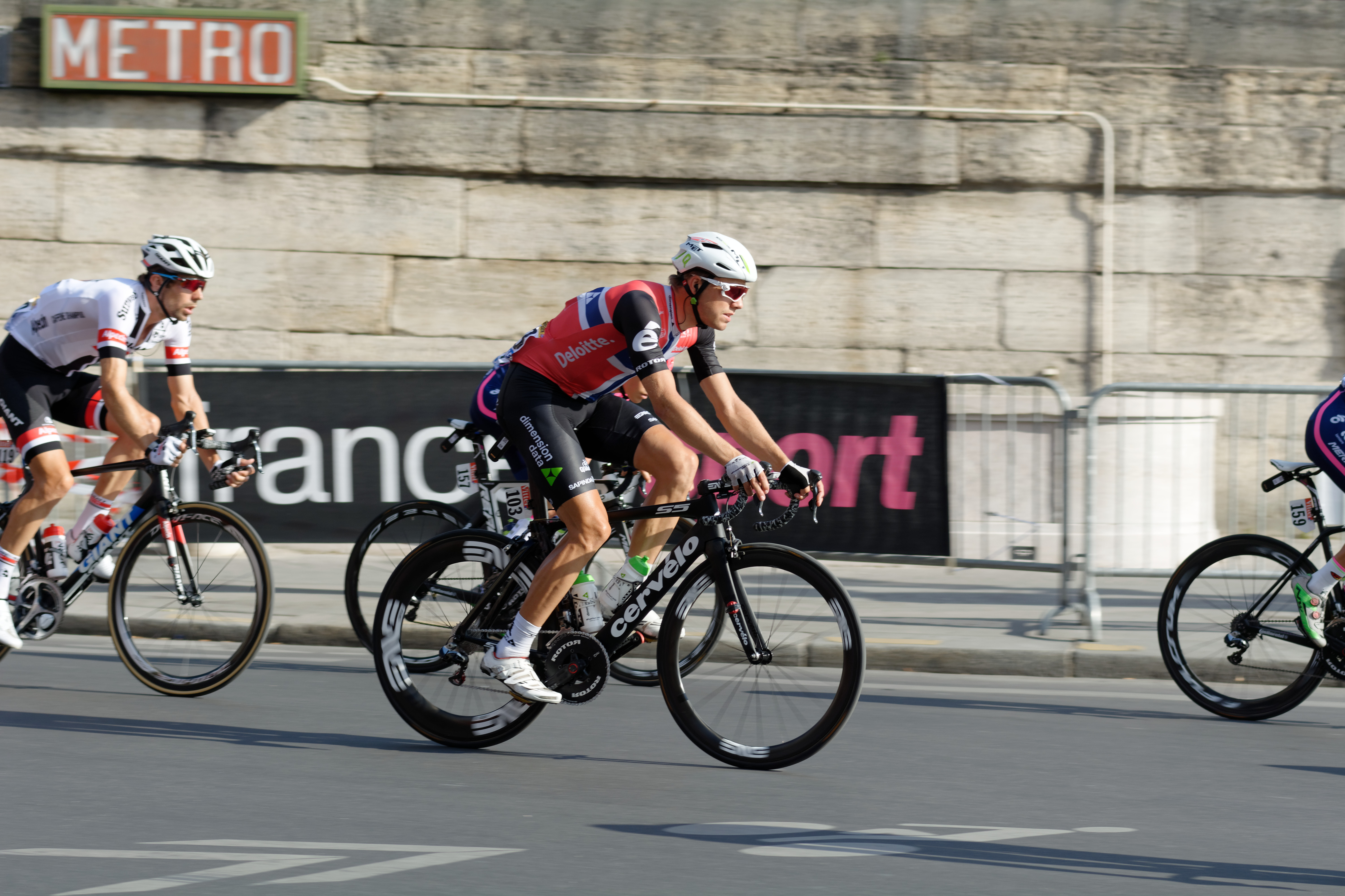 D71_9816_DxO